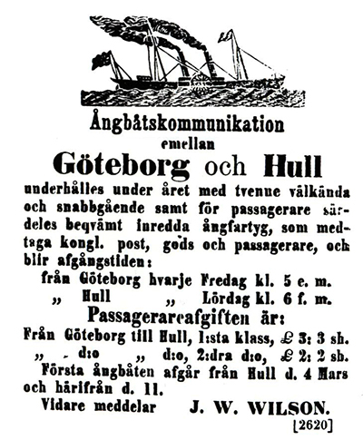 Advertisement in Göteborgs Handels- och Sjöfartstidning by Wilson Line Gothenburg-Hull